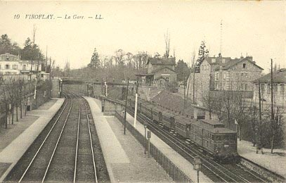 Train de banlieue tracté par un locomoteur Ouest / État 5000 en gare de Viroflay (années 1900).